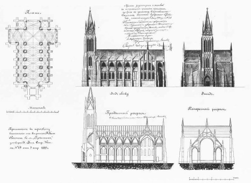 Беларуская (тарашкевіца): Гервяты (Gierviaty). Касьцёл Найсьвяцейшай Тройцы, праект